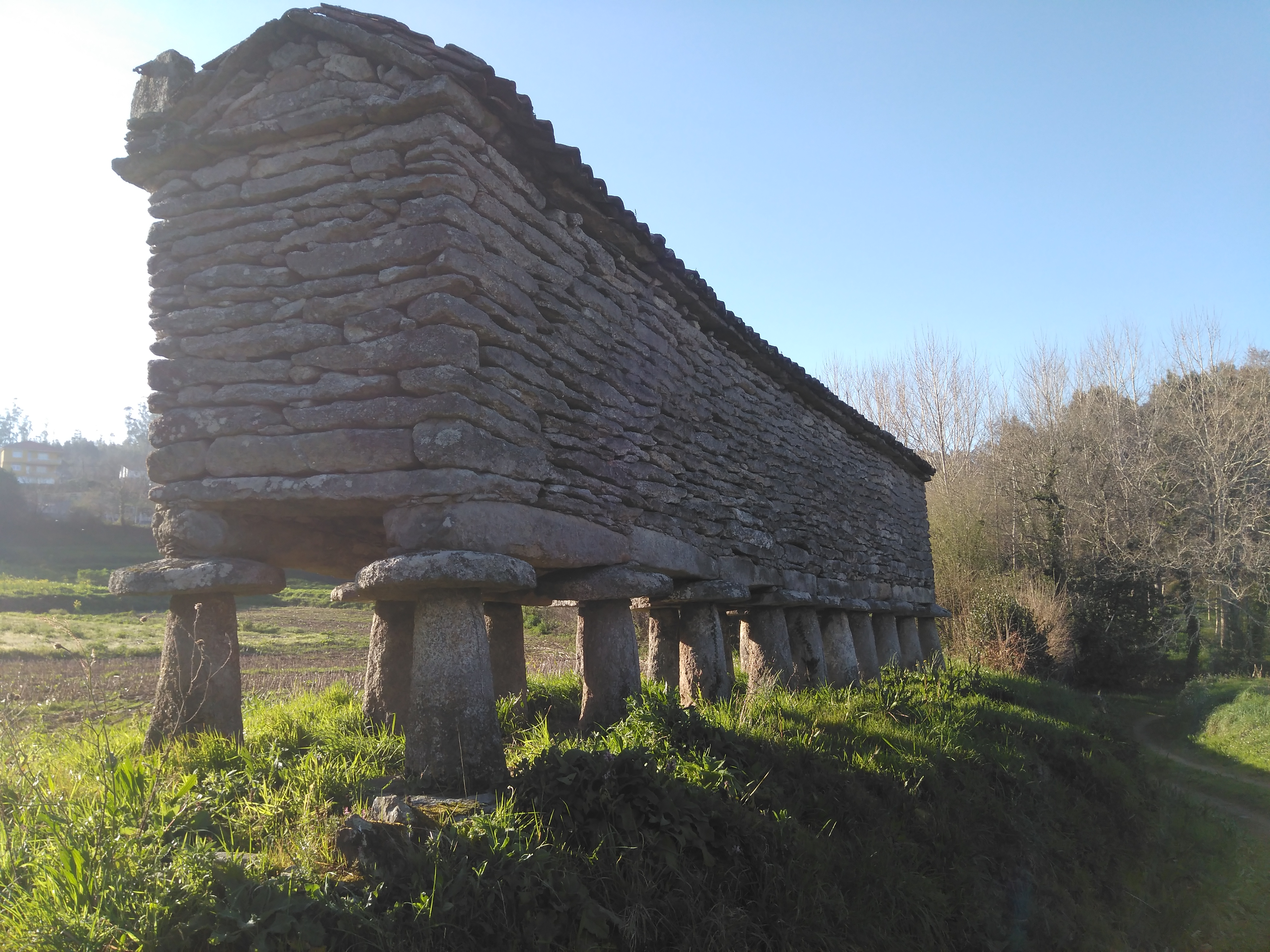 Este é un hórreo moi antigo situado en Brenlla, na parroquia de San Miguel de Couso. Nel, sitúase un reloxo de Sol que antigamente se usaba para saber a hora.